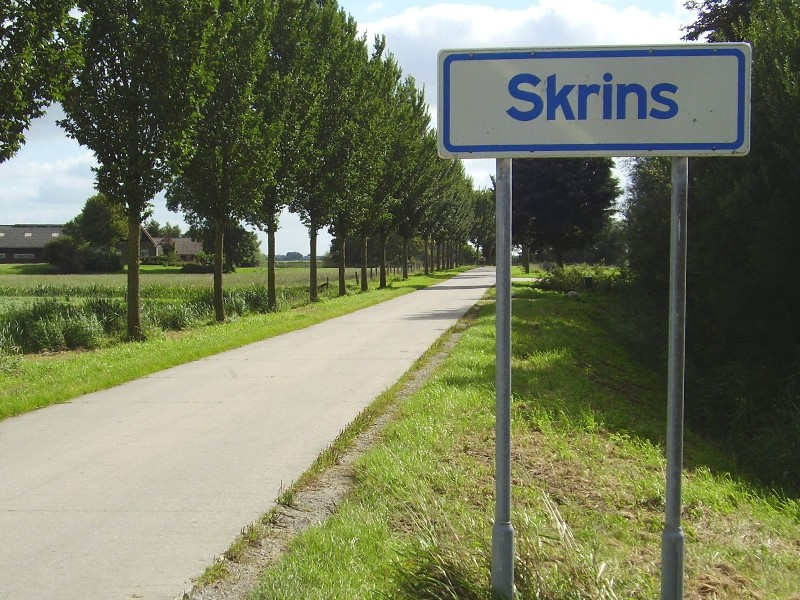 Plaatsnaambord van buurtschap Schrins in gemeente Littenseradeel (provincie Friesland, Nederland)